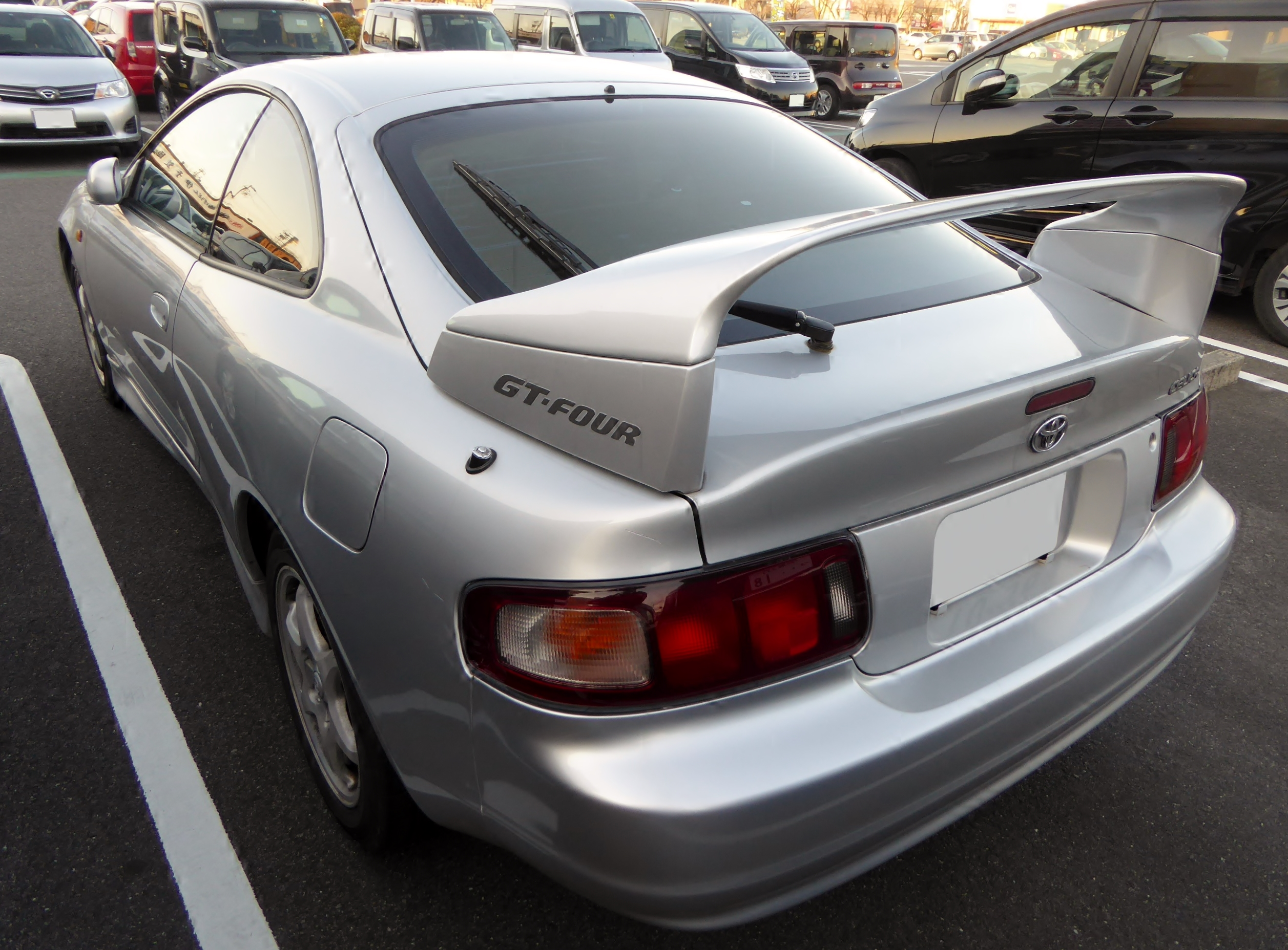 ST205型トヨタ・セリカ2.0GT-FOURをリアから撮影。